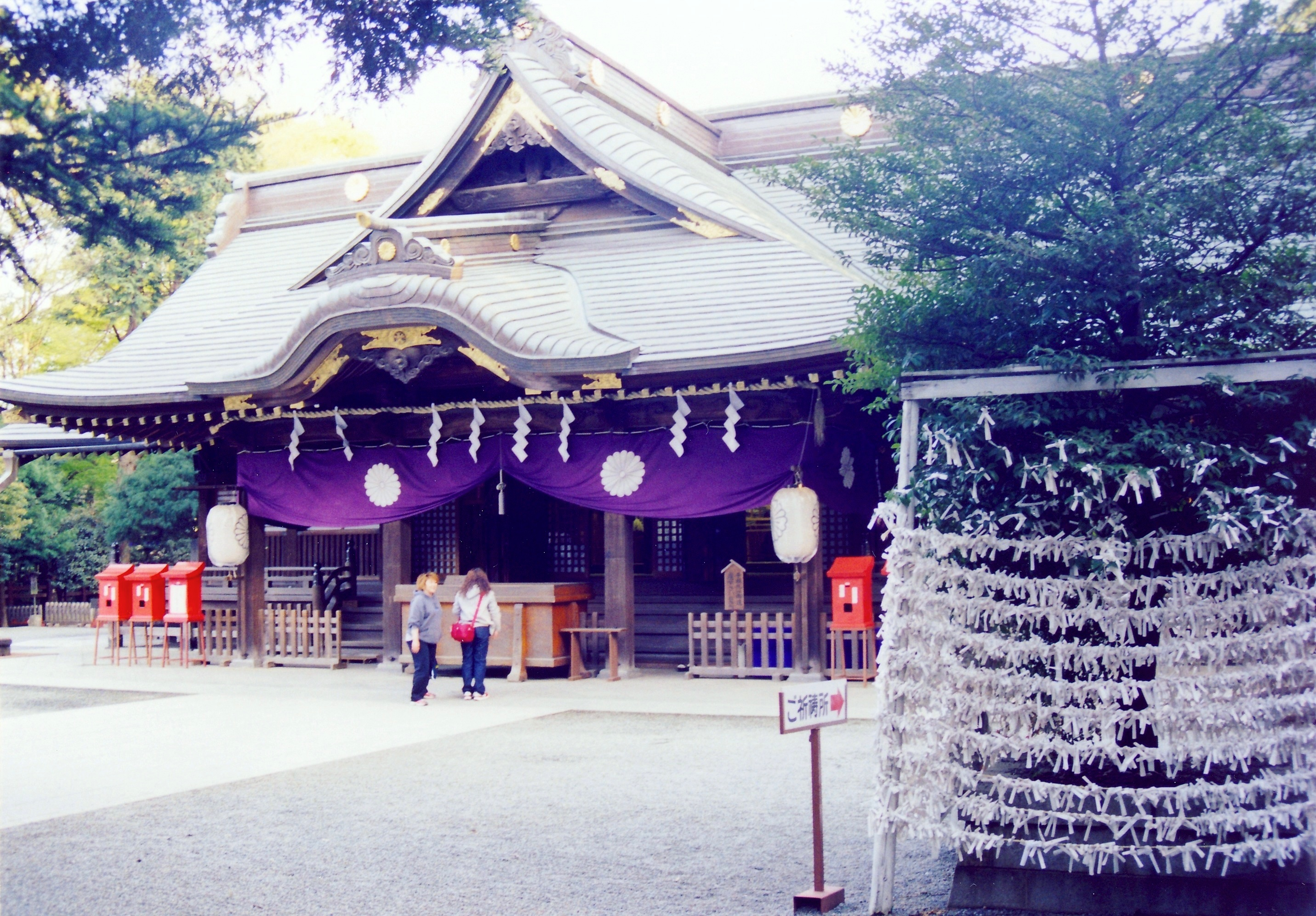 A shrein in Fuchu, Tokyo, Japan（ookunitama-jinjya, 大國魂神社)